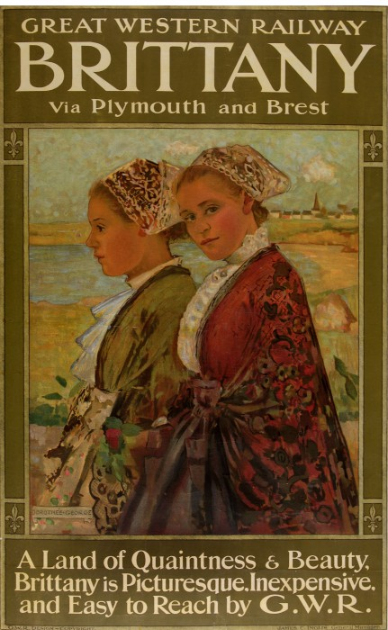 Affiche de la Great Western Railway faisant la promotion de la Bretagne, années 1900